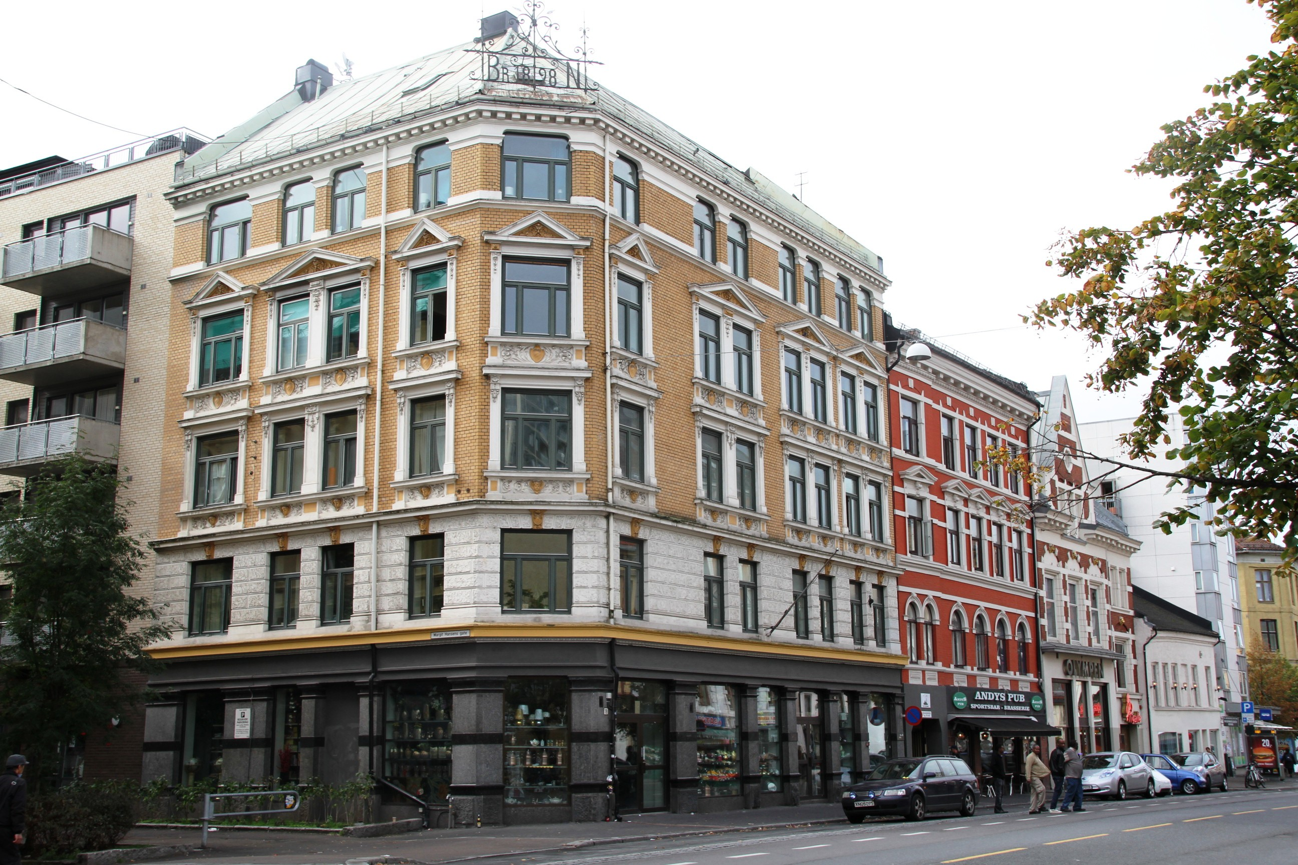 Motiv fra Grønlandsleiret, Oslo